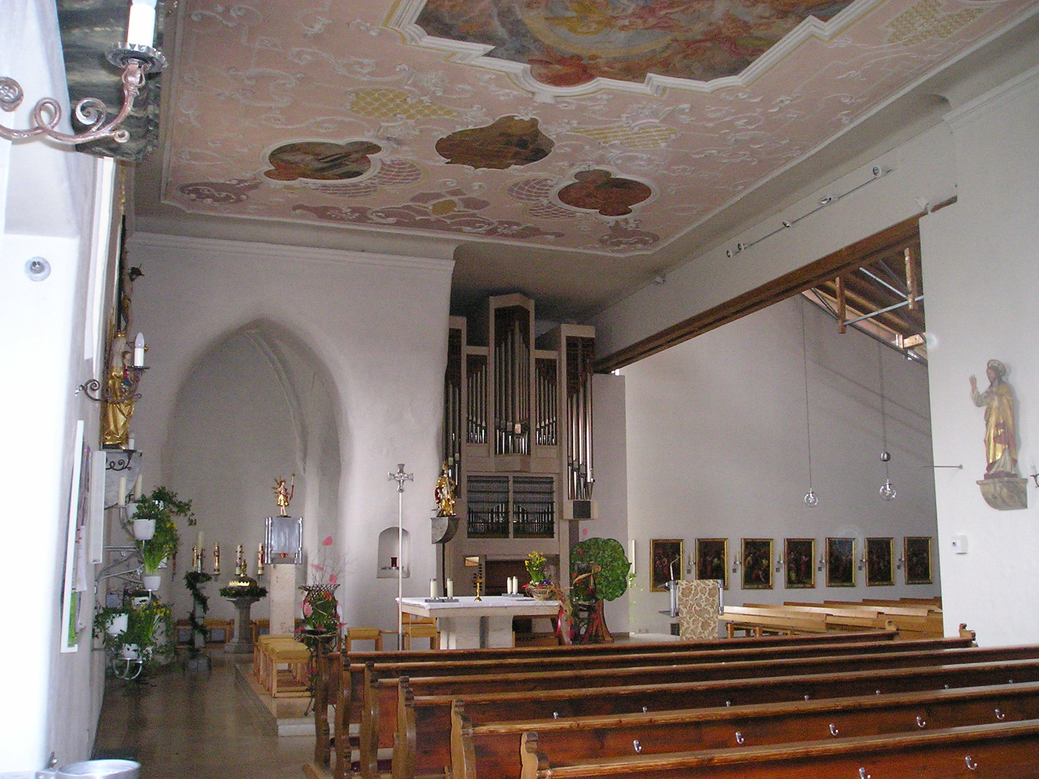 Pfarrkirche von Meckenhaus, Landkreis Roth, Kircheninneres mit neuer Altarinsel